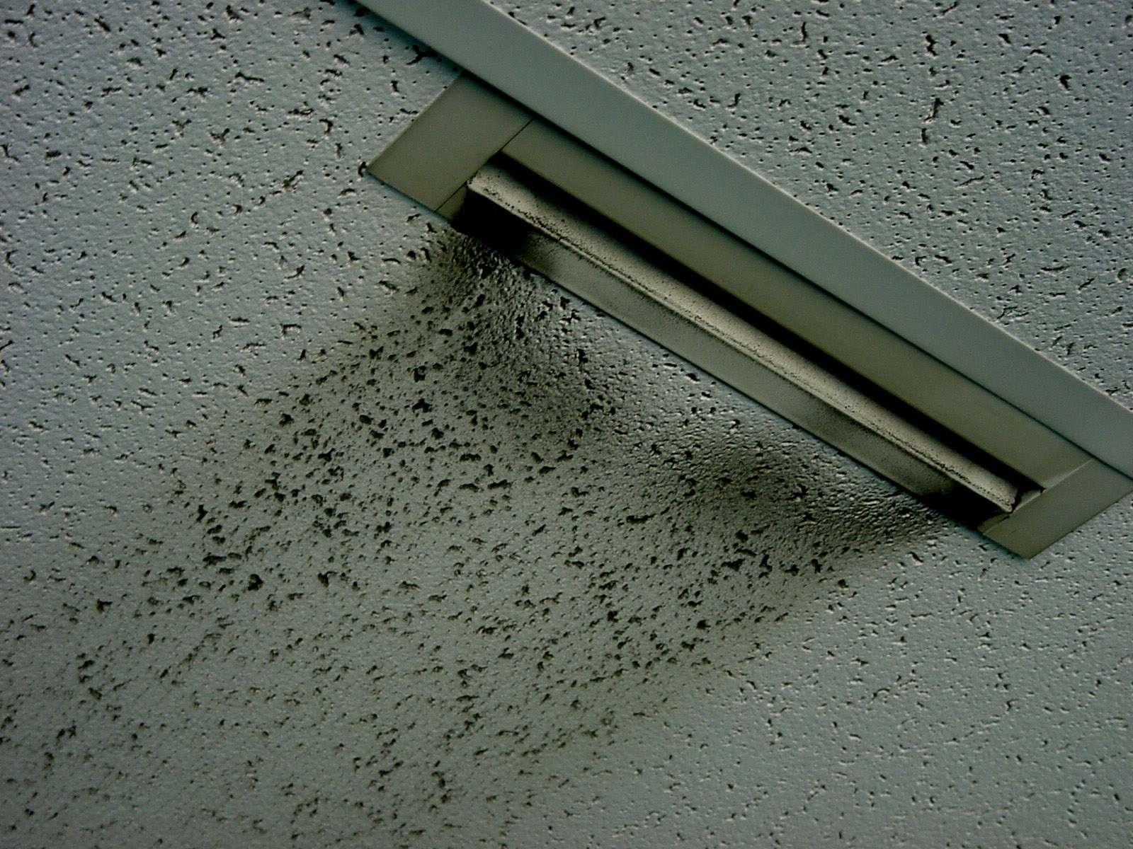 Dépôt de poussières grasses et noires, bâtiment de centre ville situé près d'une importante gare et d'un réseau de voies ferrées.